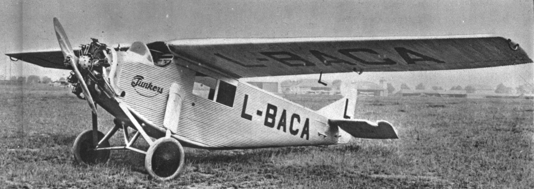 Motor Walter NZ-120 a letadlo Junkers K 16bo